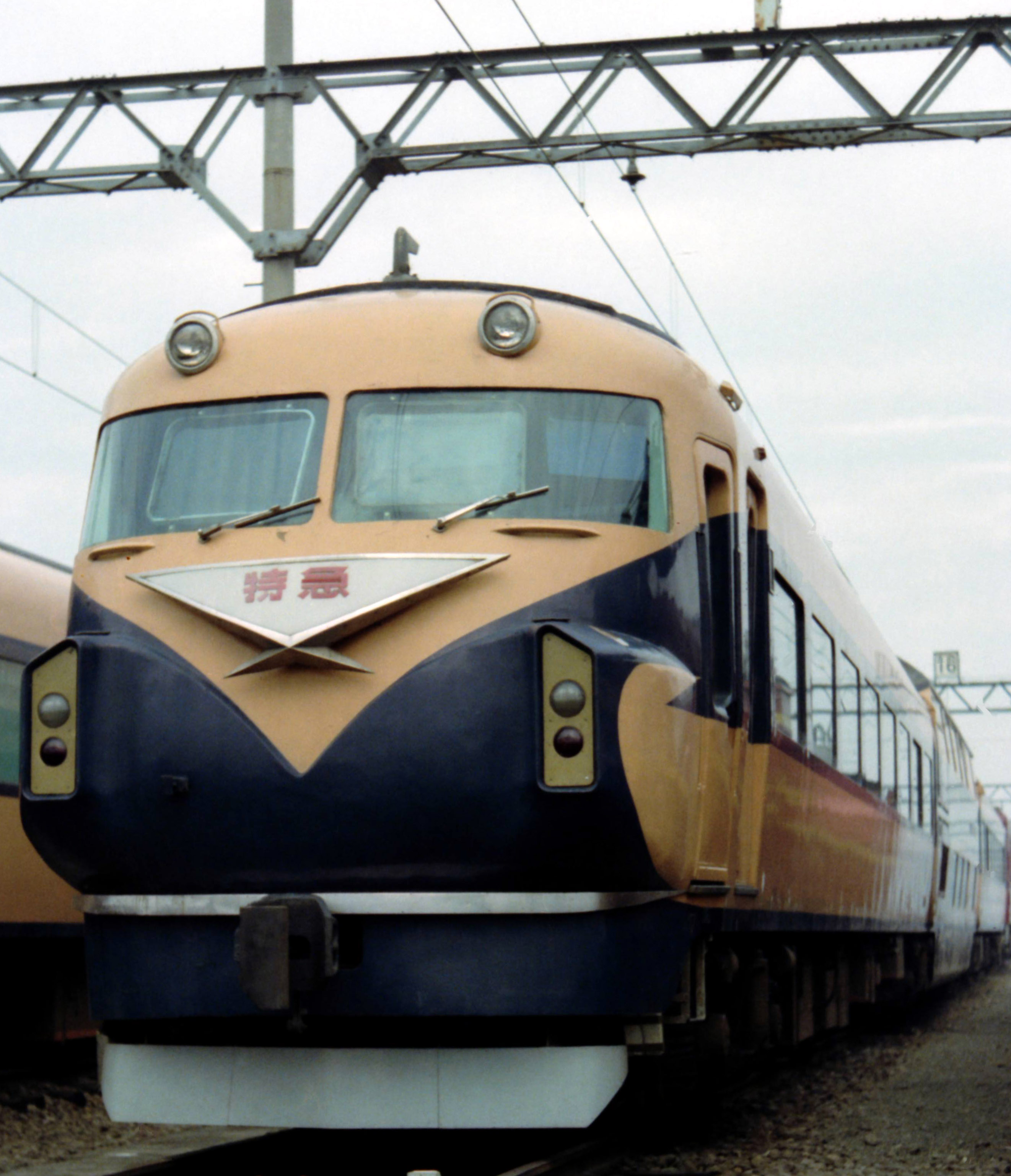 近鉄10100系電車 高安車庫S55